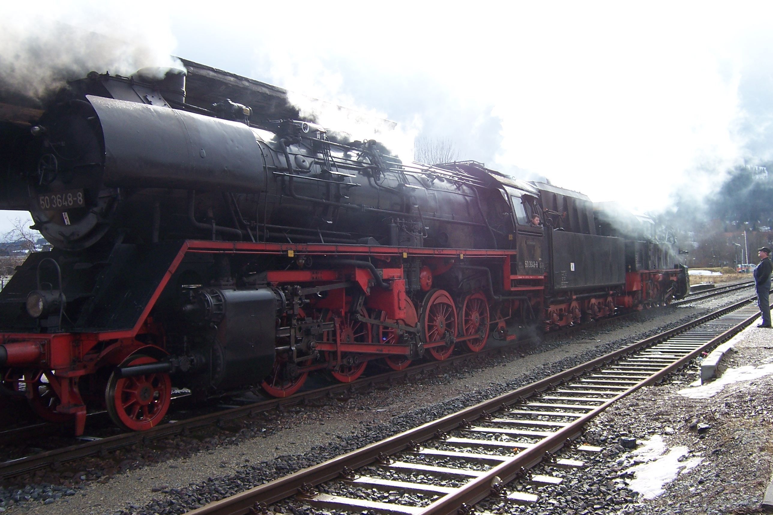 Lokomotive 50 3648-8 im Bahnhof Ilmenau, im Hintergrund Lokomotive 94 1538.